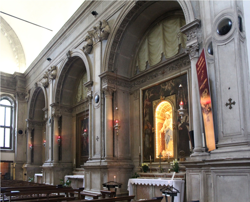 Cappelle laterali settentrionali - Chiesa di S. Pietro in Oliveto - Brescia